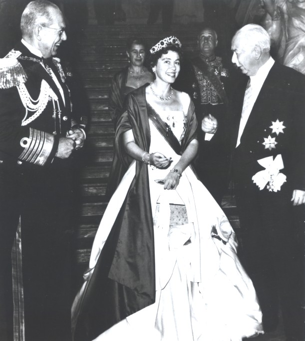 König Paul I. der Hellenen und Patron des Alexander-Ordens mit Königin Friederike von Griechenland und Bundespräsident Prof. Dr. Theodor Heuss beim Staatsbesuch 1954 in Deutschland.